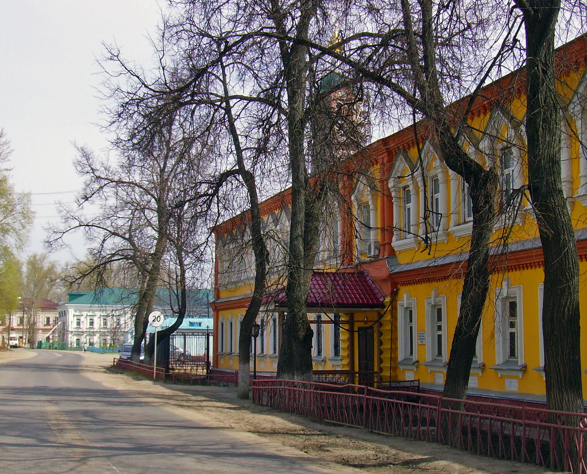 Выкса. Духовное училище.